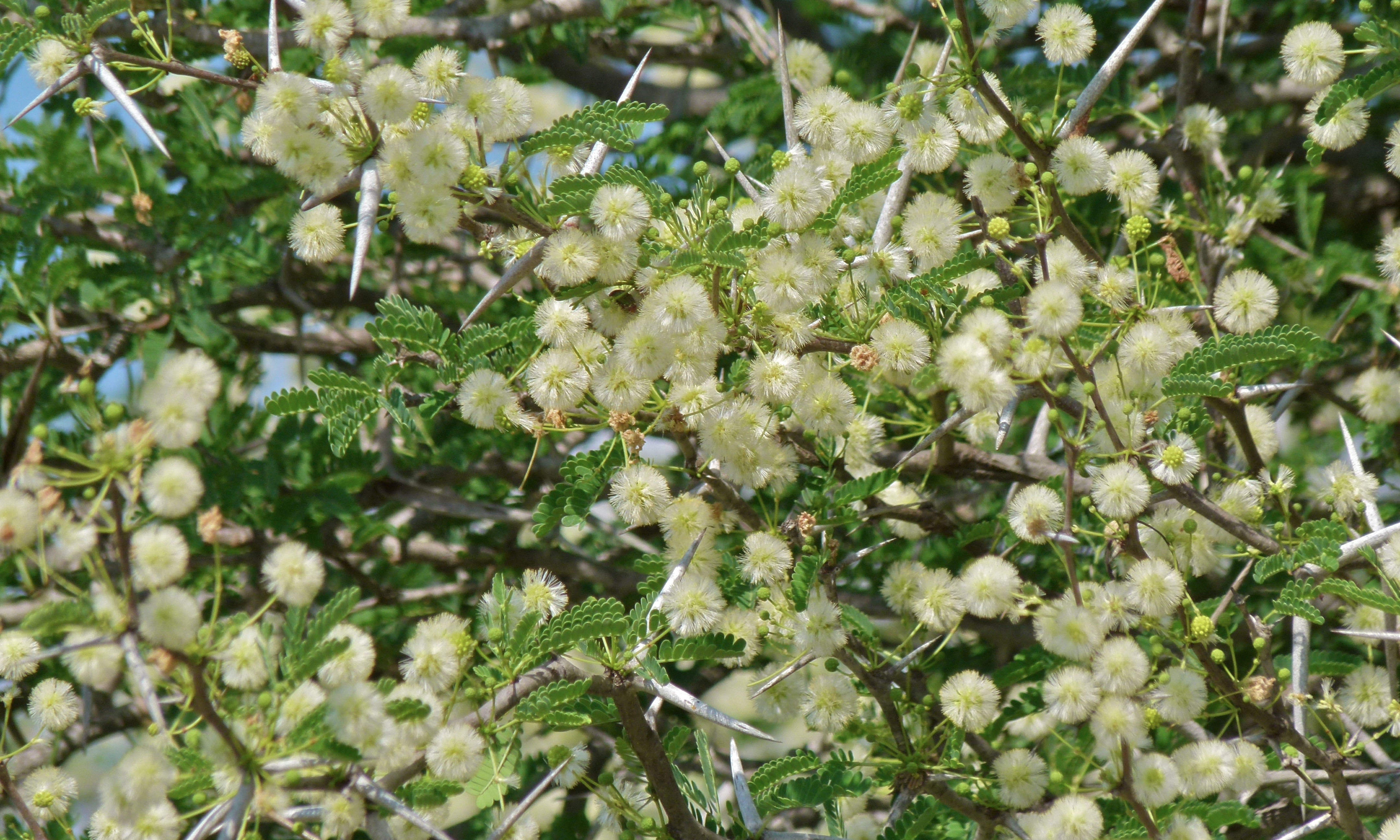 S39 near Ratelpan, Kruger NP, SOUTH AFRICA